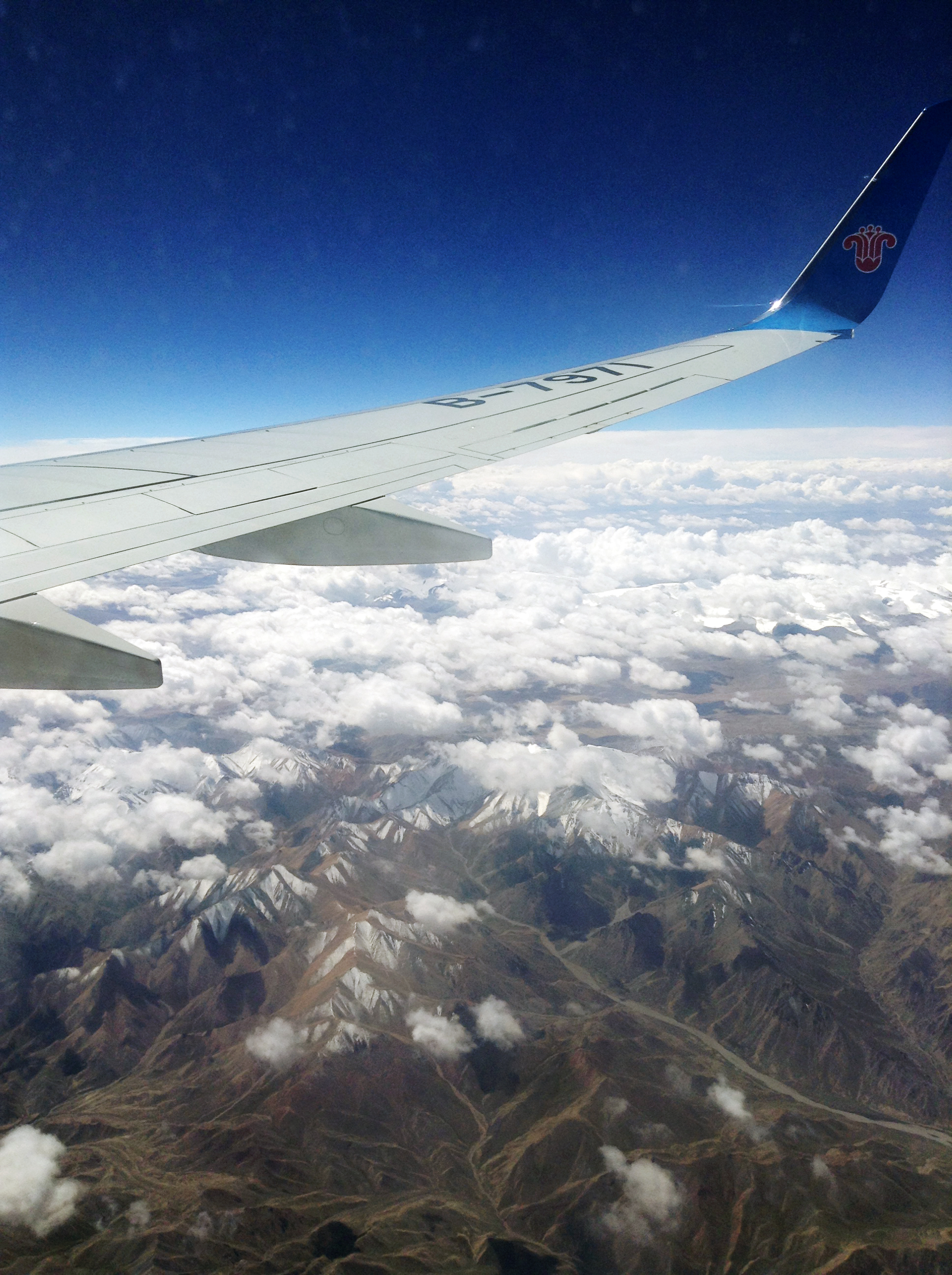 祁连山脉航拍。